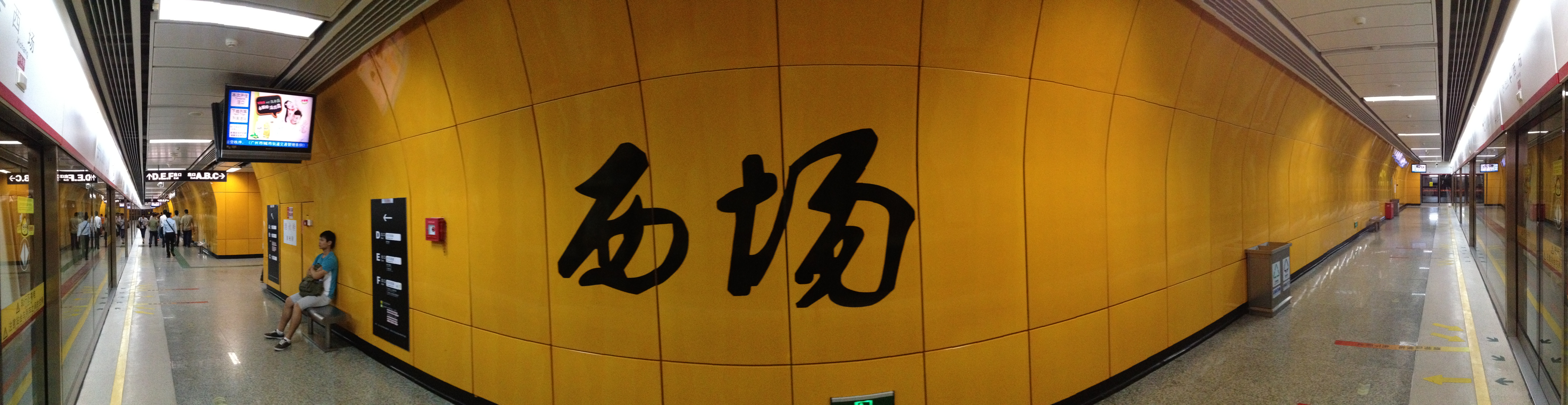 广州地铁西场站月台全景图